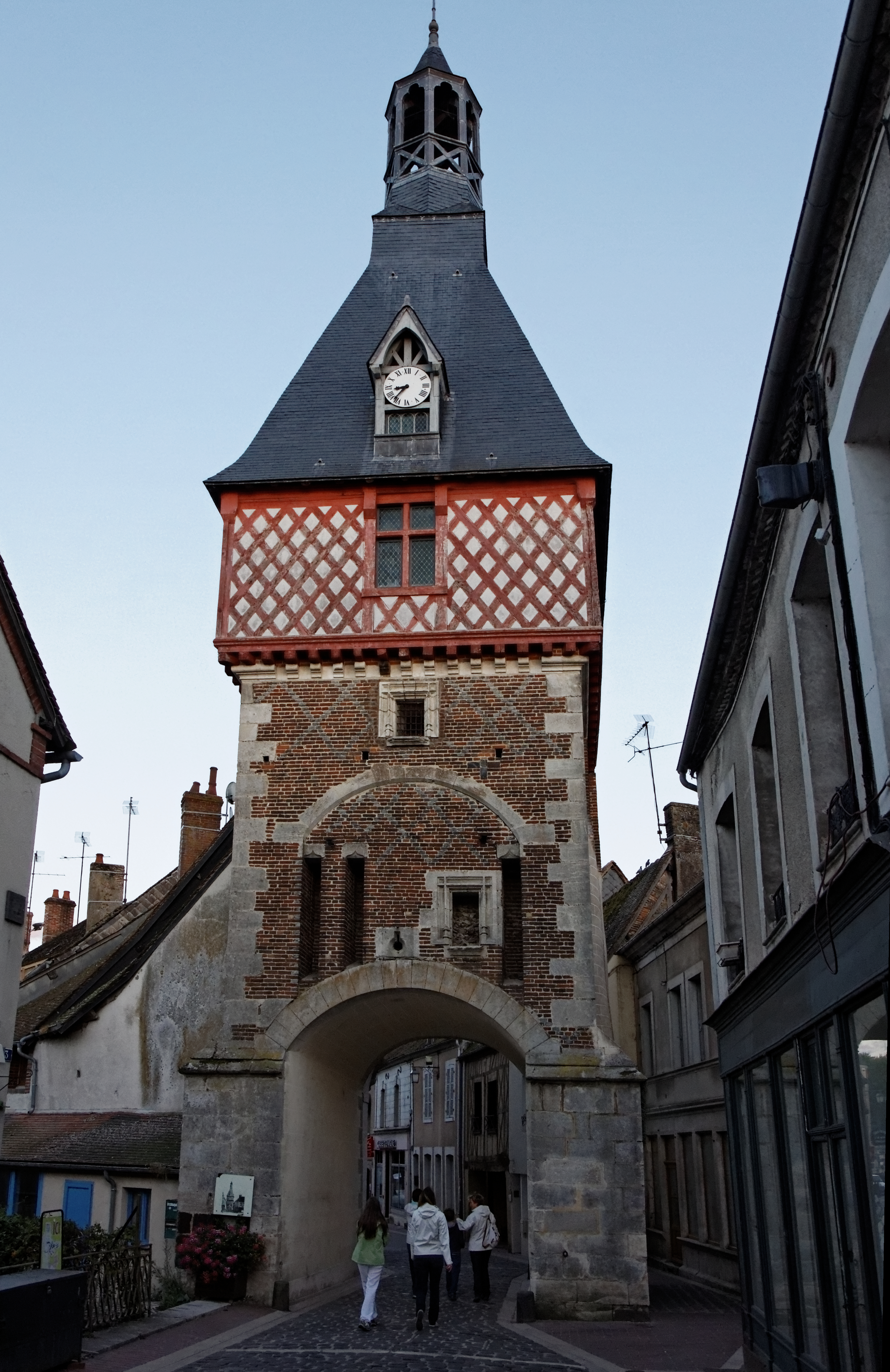 La tour de l'horloge à Saint-Fargeau.